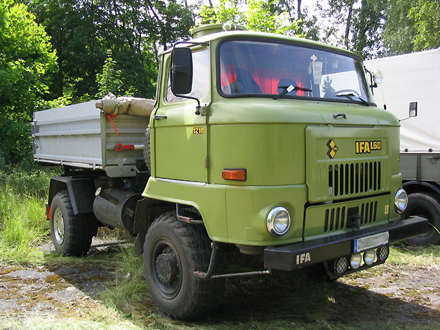 Beschreibung: IFA L60 Quelle: fotografiert am 3. Juli 2004 Fotograf: Darkone